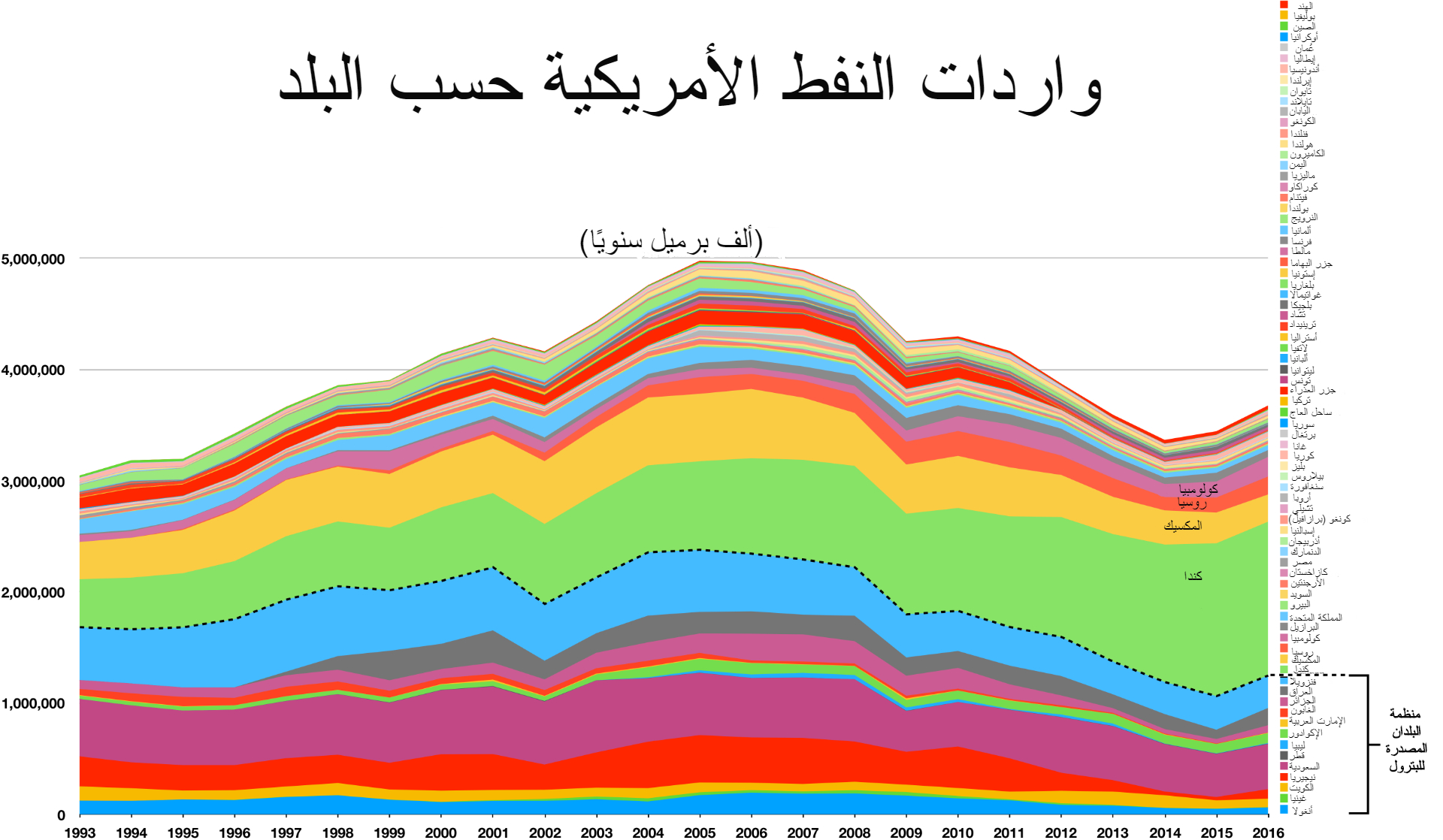 واردات النفط الأمريكية حسب البلد